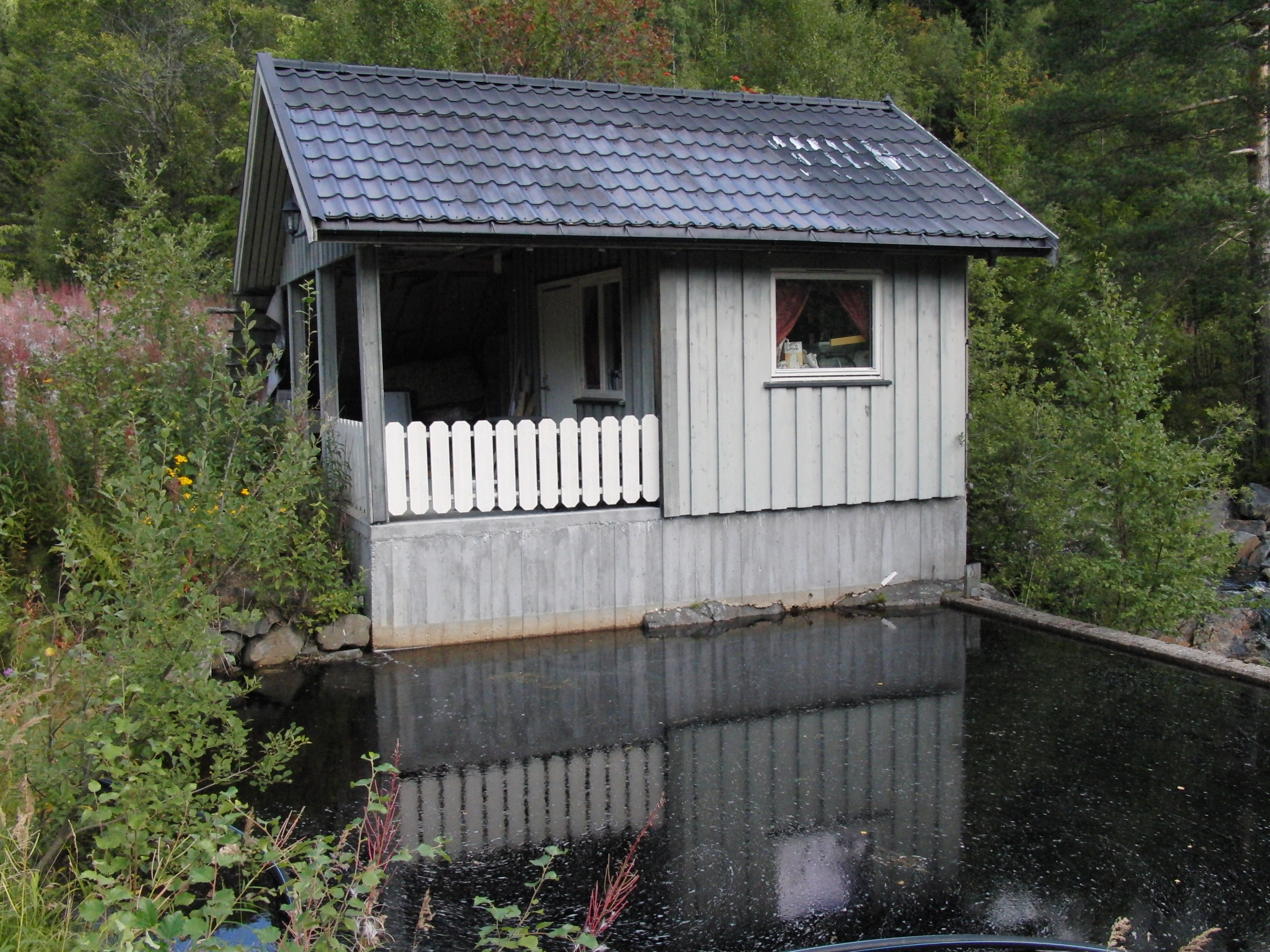 Reiersdalen kraftverk